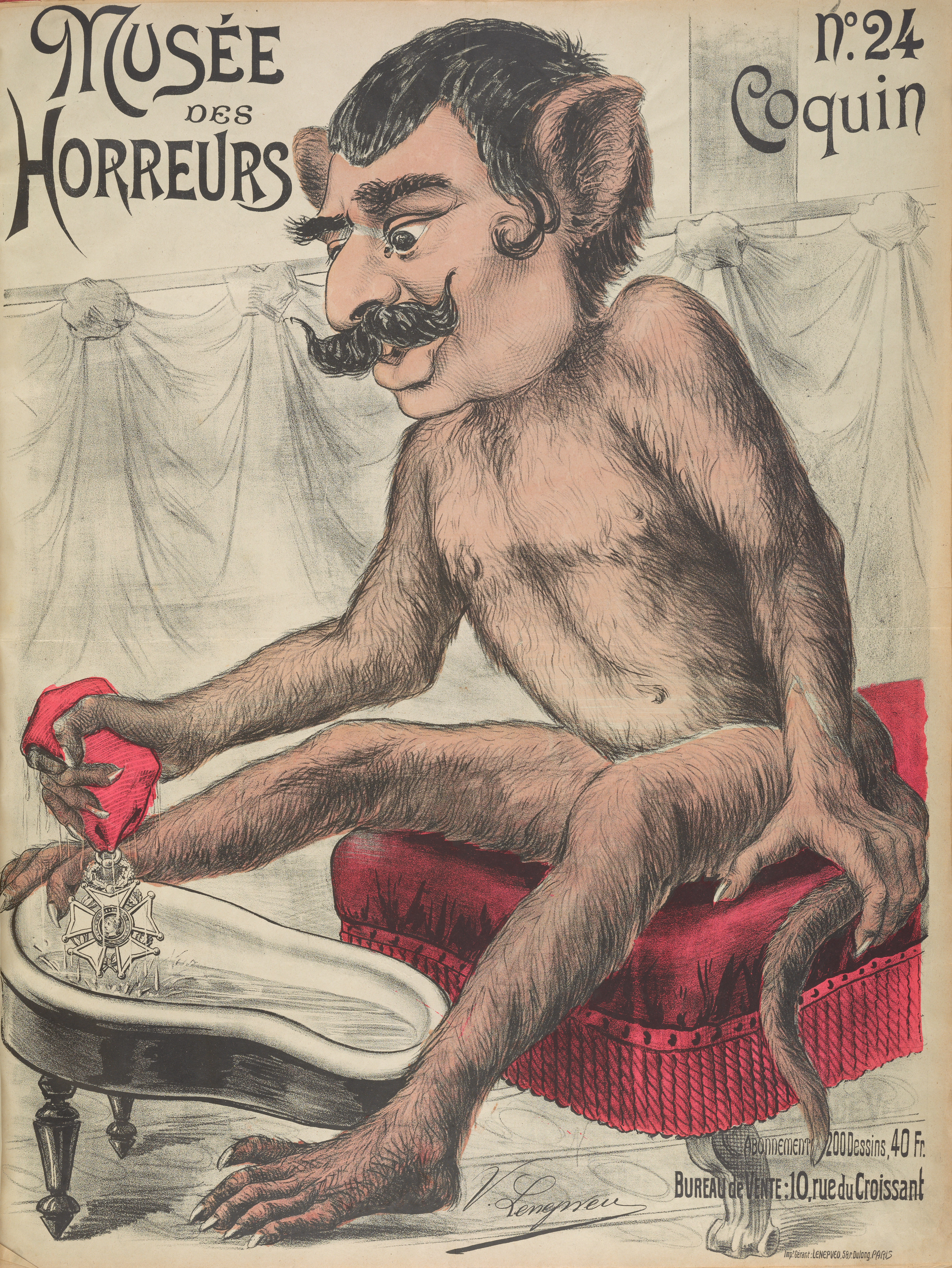 "Coquin" (Isidore-René Jacob-Paquin).